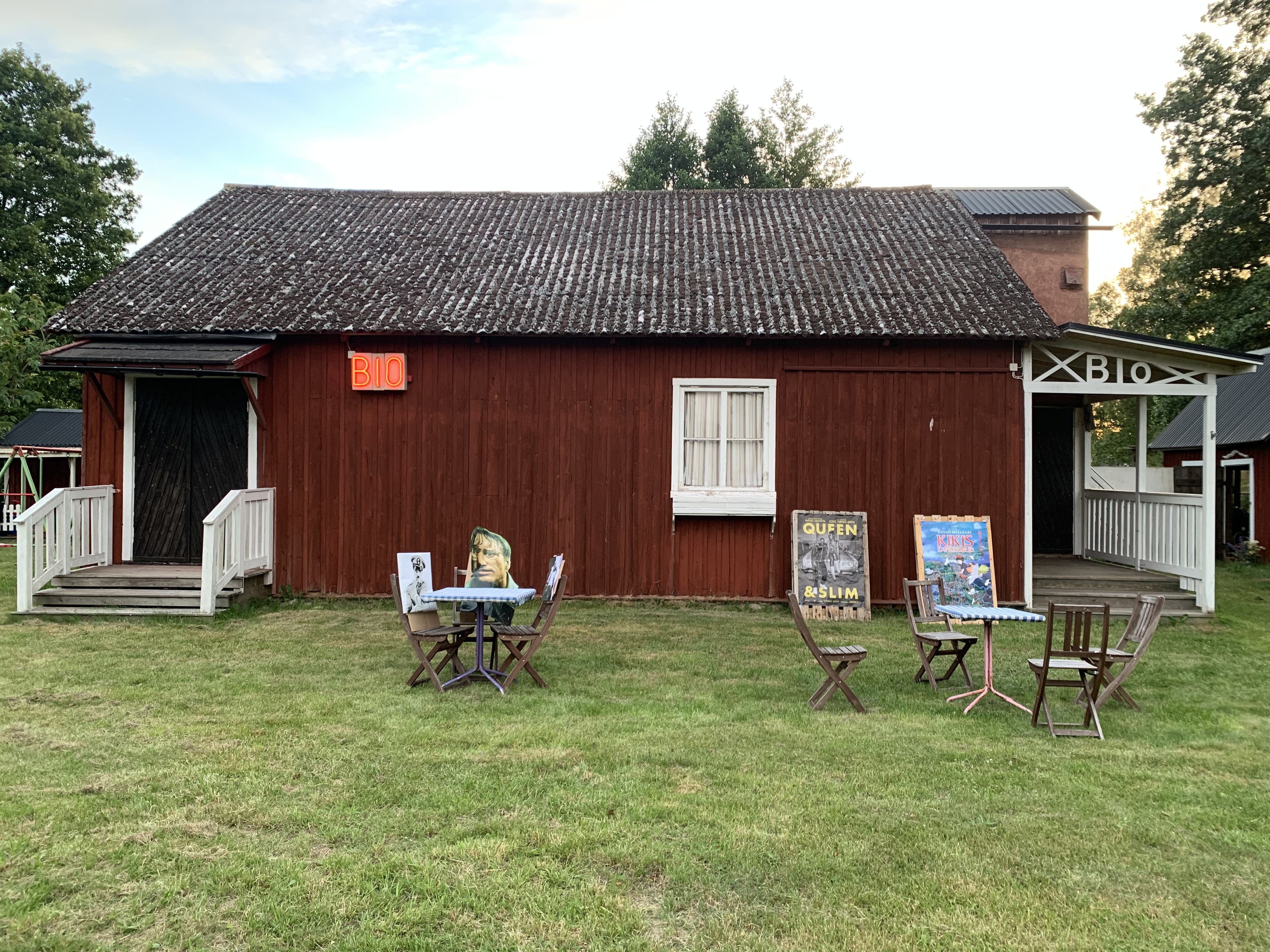 Sudersandsbiografens östra sida sommaren 2020.